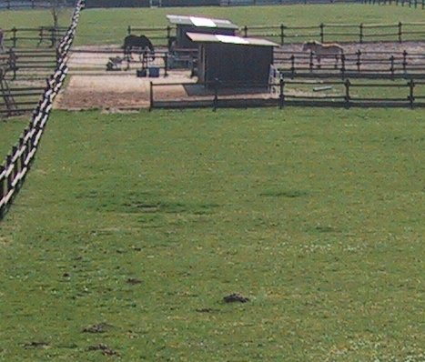 selbst fotografiert, Offenstall bei Glessen